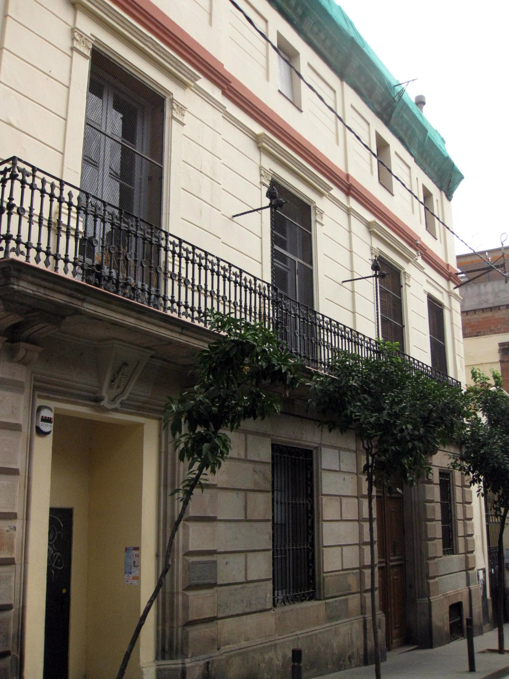 Cal Ros del Maiol (Barcelona)